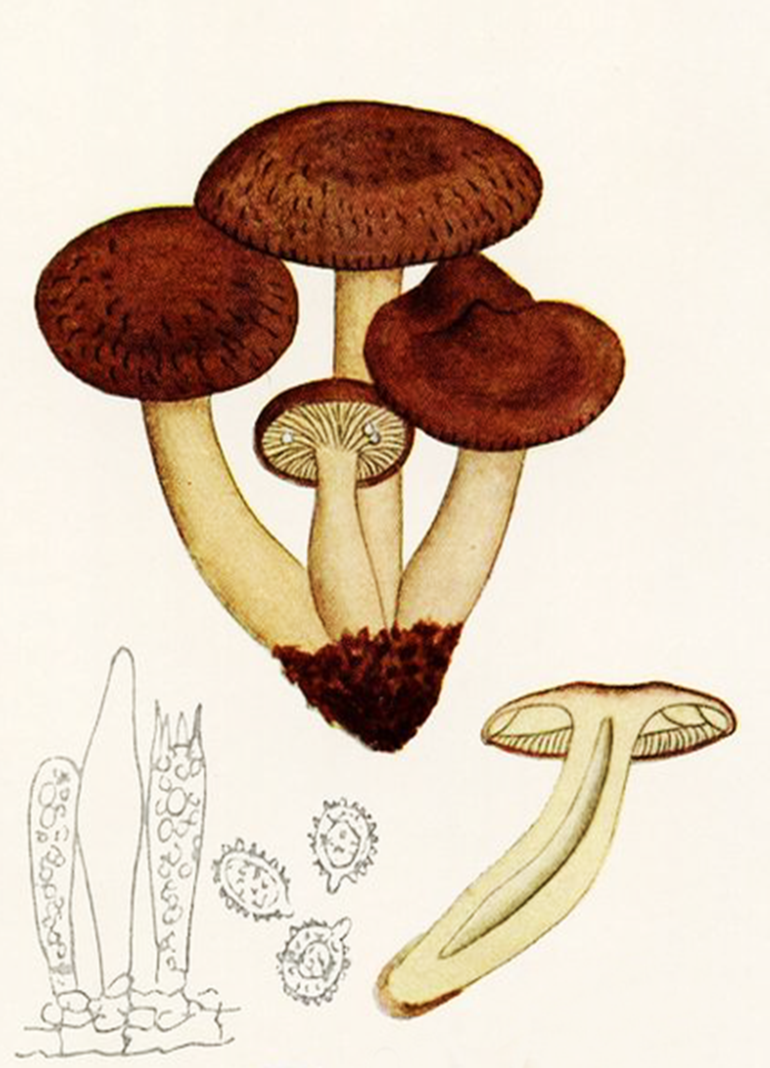 Bres.: Lactarius subumbonatus (Lingr. (1845)